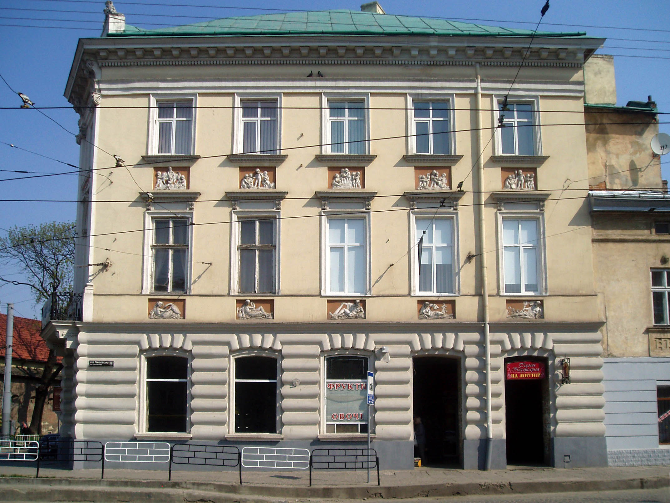 Будинок на розі вулиць Личаківської і Винниченка. Вигляд зі сторони Личаківської (бл. 1804-1805)